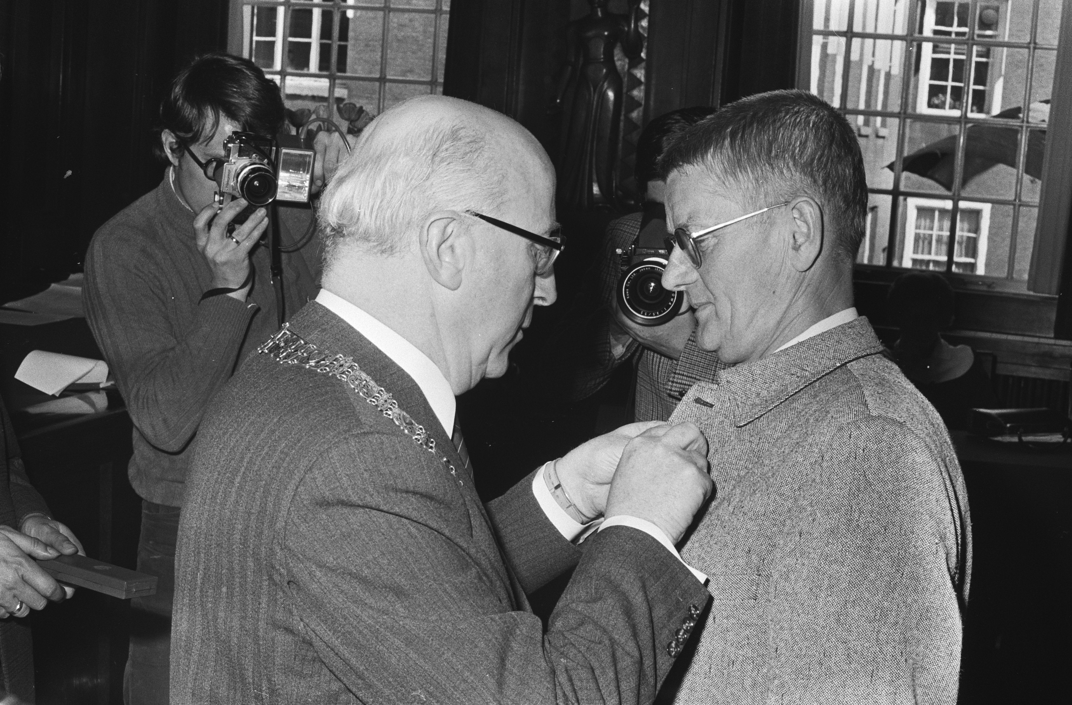 Uitreiking van onderscheidingen ter gelegenheid van de verjaardag van koningin Juliana door burgemeester Samkalden in de raadszaal te Amsterdam, 29 april 1971. Cas Oorthuys